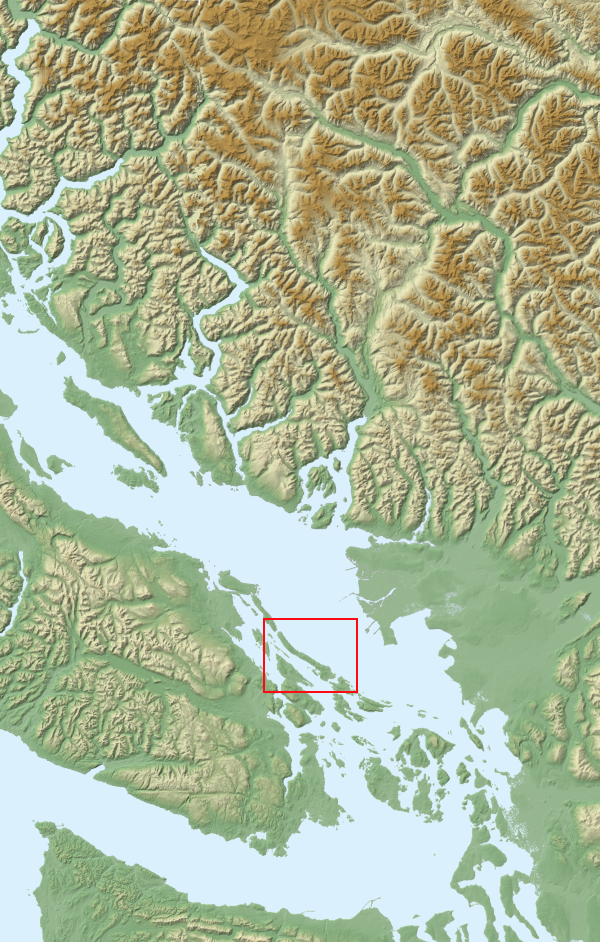 Carte du sud-ouest de la Colombie-Britannique permettant de localiser l'île Galiano. Données cartographiques obtenues sur le site FTPdu SRTM (Shuttle Radar Topography Mission) de la NASA. Visualisation des données sur le logiciel 3DEM de Visualization Software LLC. Projection UTM. Correction des défauts et assemblage des portions de cartes sur . Carte réalisée en s'aidant du didacticiel de Sting.